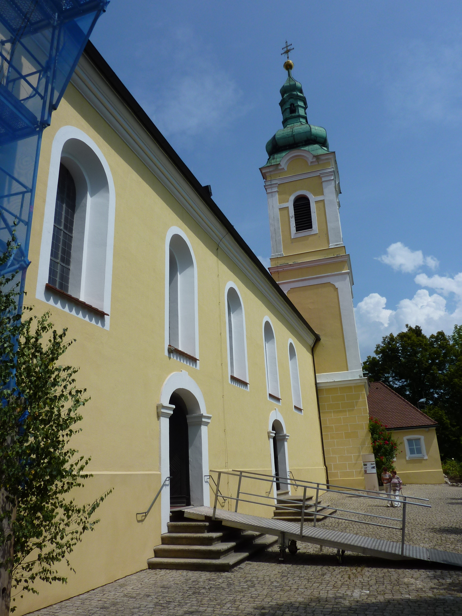 Katholische Wallfahrtskirche St. Anna, Sulzbach-RosenbergThis is a photograph of an architectural monument.